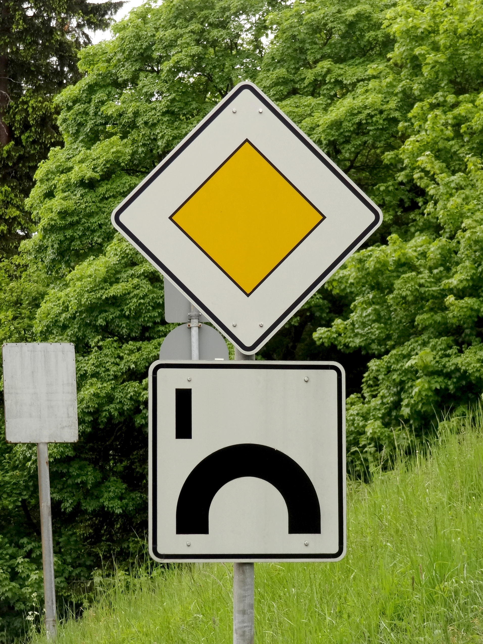 Verlauf der Vorfahrtstraße, Kehre einer Serpentine zum Großen Feldberg (Taunus)